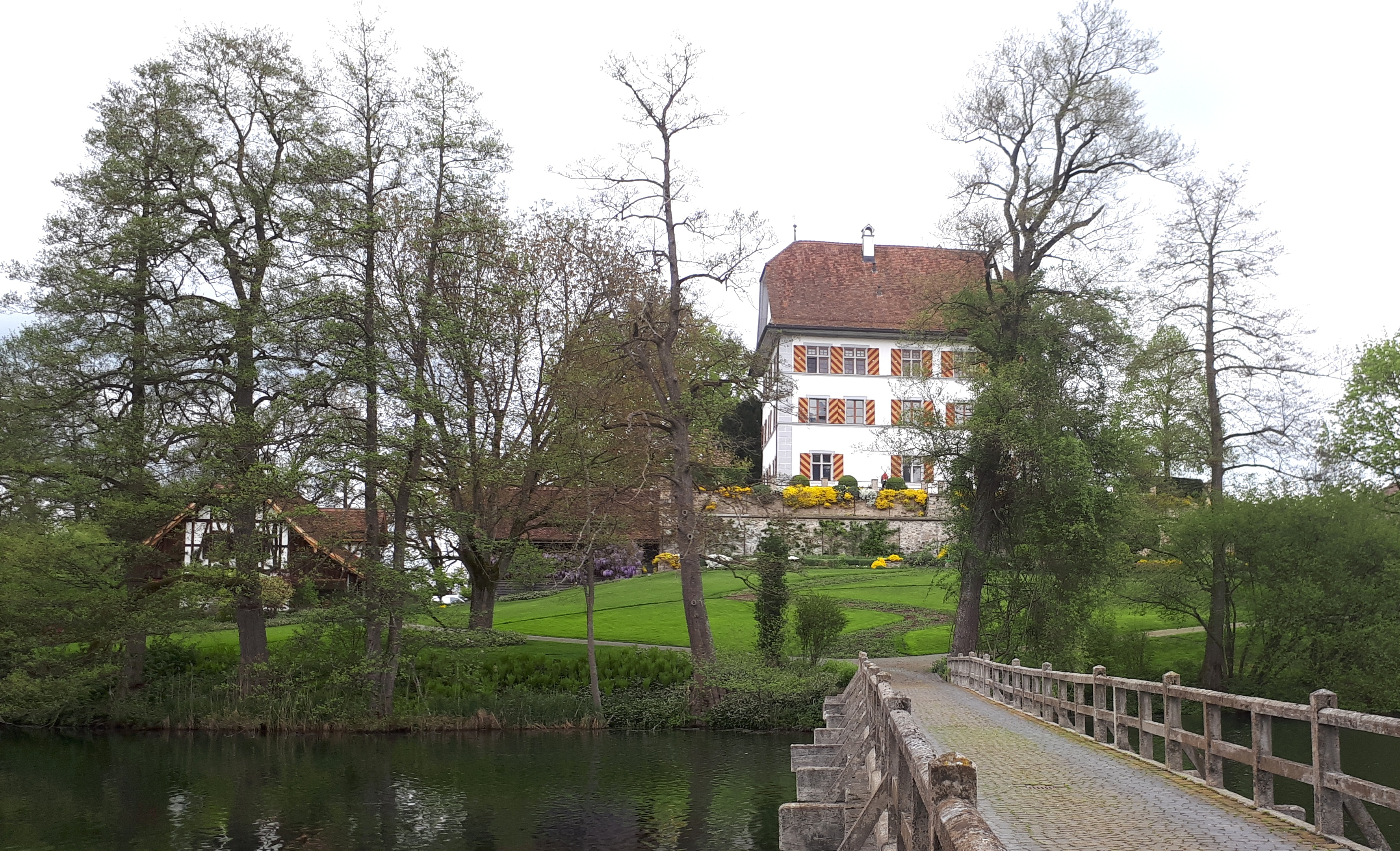 Schloss Mauensee, Kanton Luzern, Schweiz